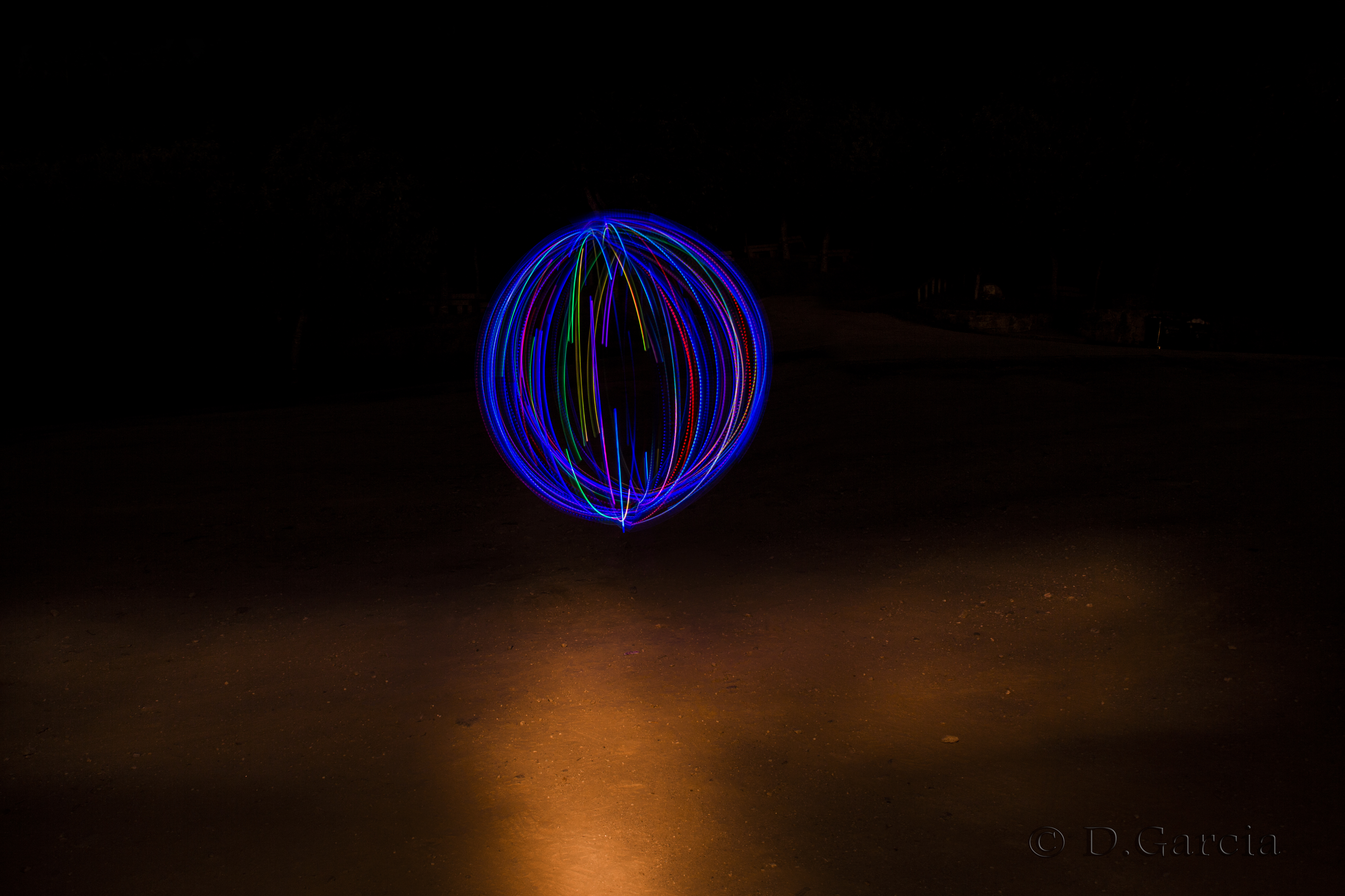 Esfera RGB